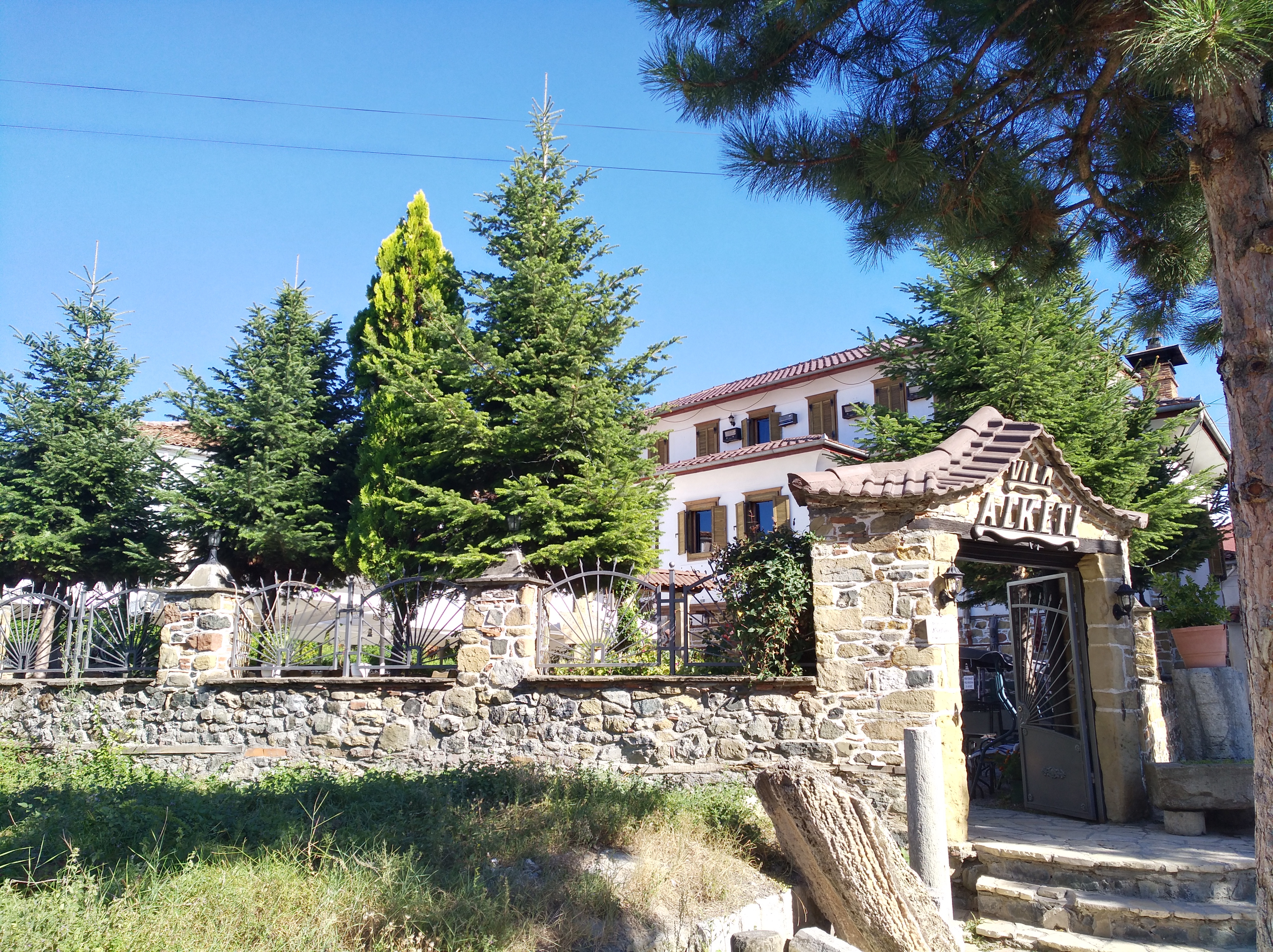 Maison de Xhaferr Ypit, aujourd'hui transformé en restaurant "Villa Alketi", à Korçë en Albanie.